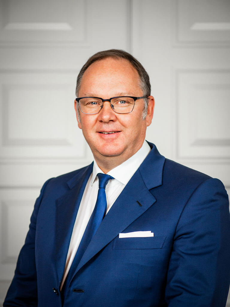 Harald Christ Portrait